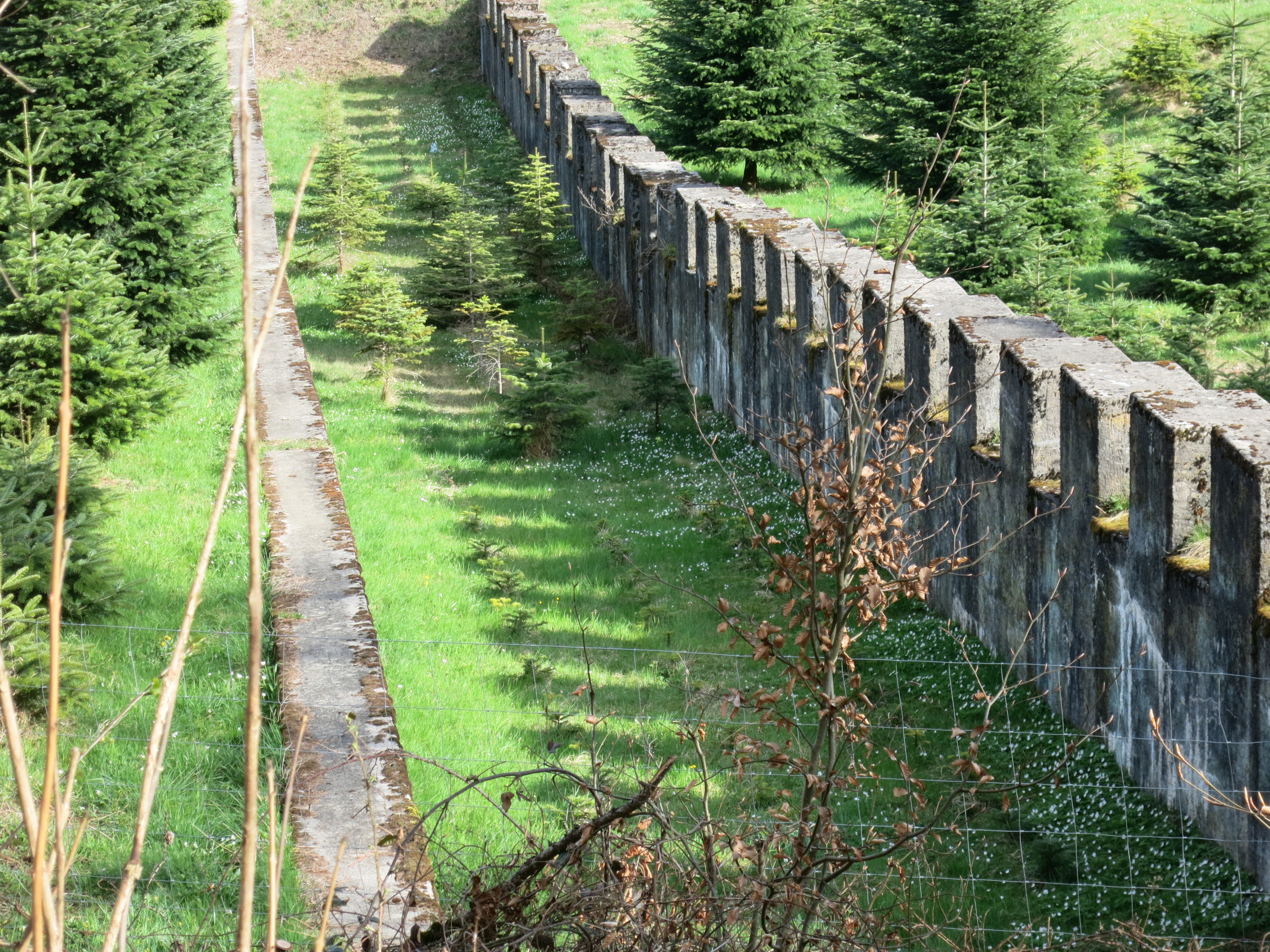 Tankgraben T2510 Waldegg ZH, Schweiz